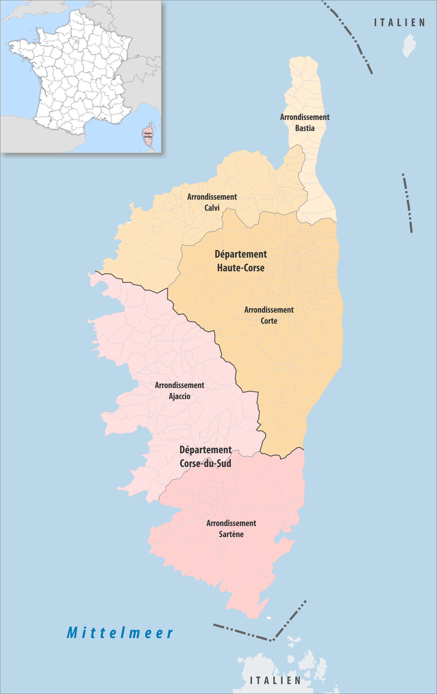 Gemeinden, Arrondissemente und Departemente in der Region Korsika